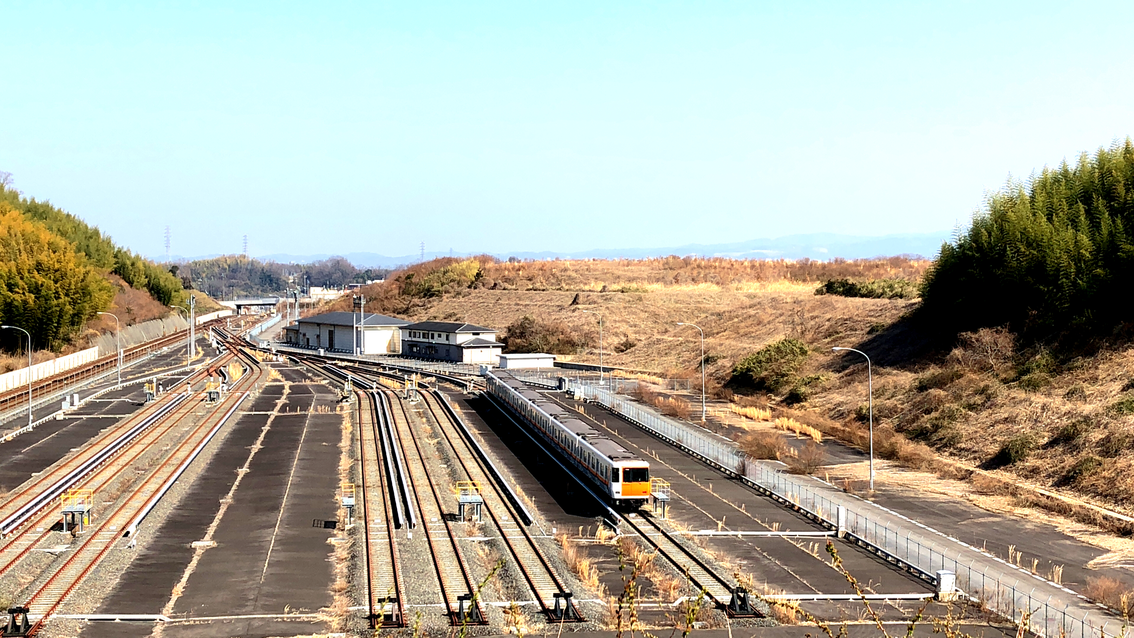 登美ヶ丘信号場と近鉄7000系